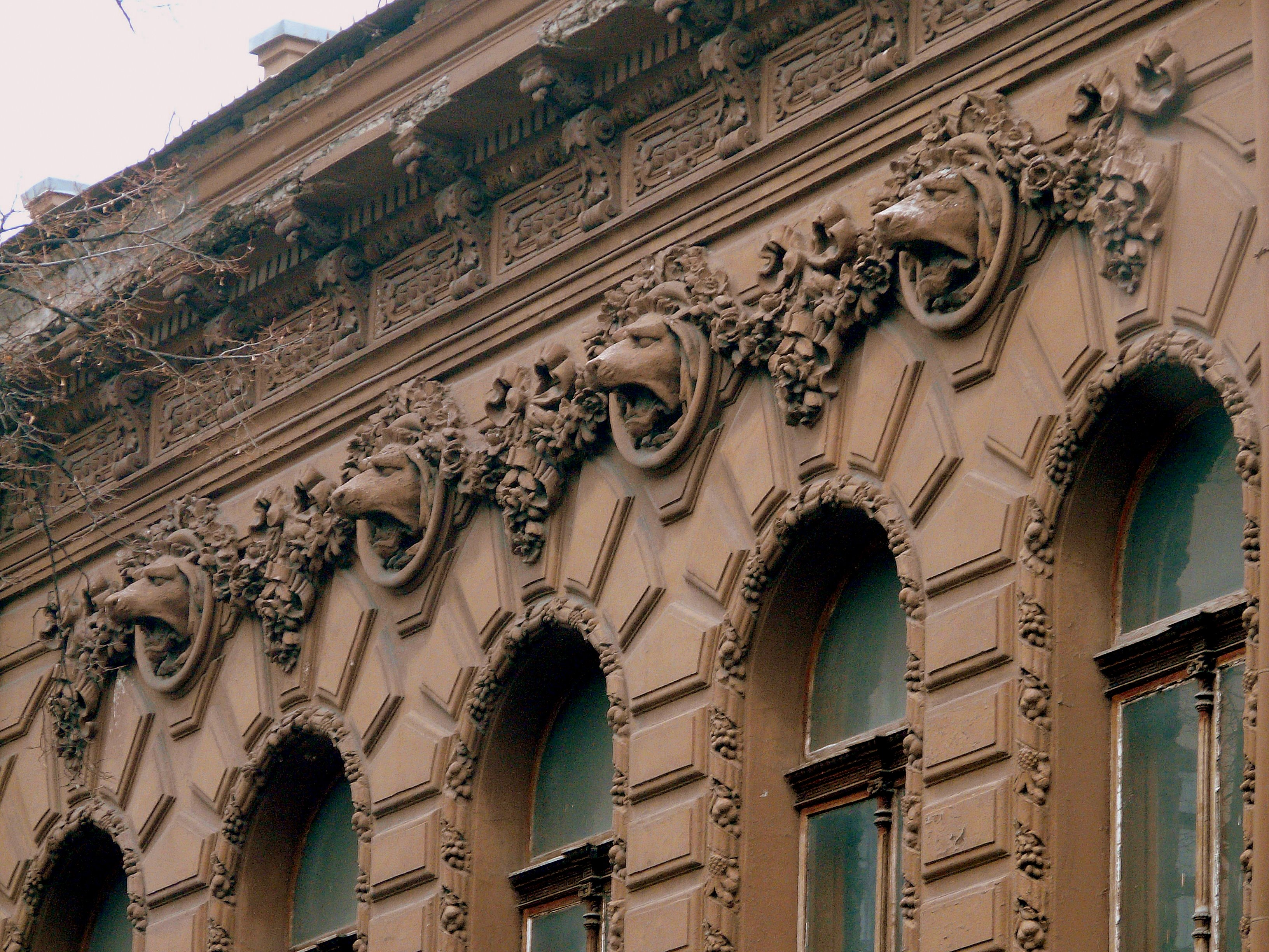 Особняк, в якому мешкали Кістяківський І. О., міністр внутрішніх справ УНР; Раковський Х. Г., рад. держ. діяч, народний комісар іноз.справ УРСР, київський губернатор; Яворський М. І., академік ВУАН УРСР; Макаренко М. О., археолог, музеєзнавець, Київ, Шовковична вул., 17/2